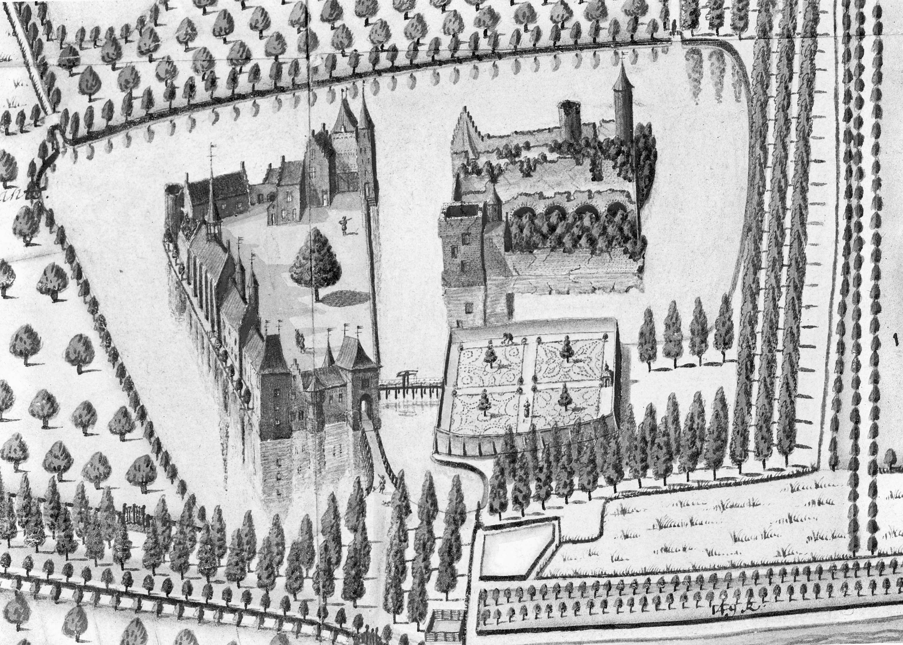 Diversen: Kasteel, tekening in Algemeen Rijksarchief